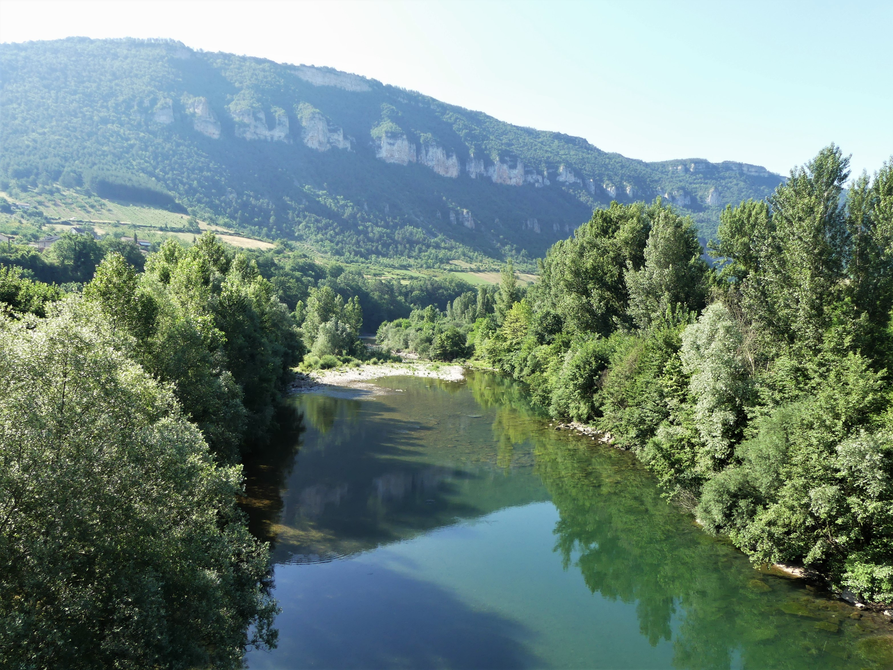 Le Tarn au pont de la route départementale 512, en limite de La Cresse (à gauche et en arrière-plan) et Compeyre (à droite), Aveyron, France. Vue prise en direction de l'aval et de la corniche du roc Pointu.